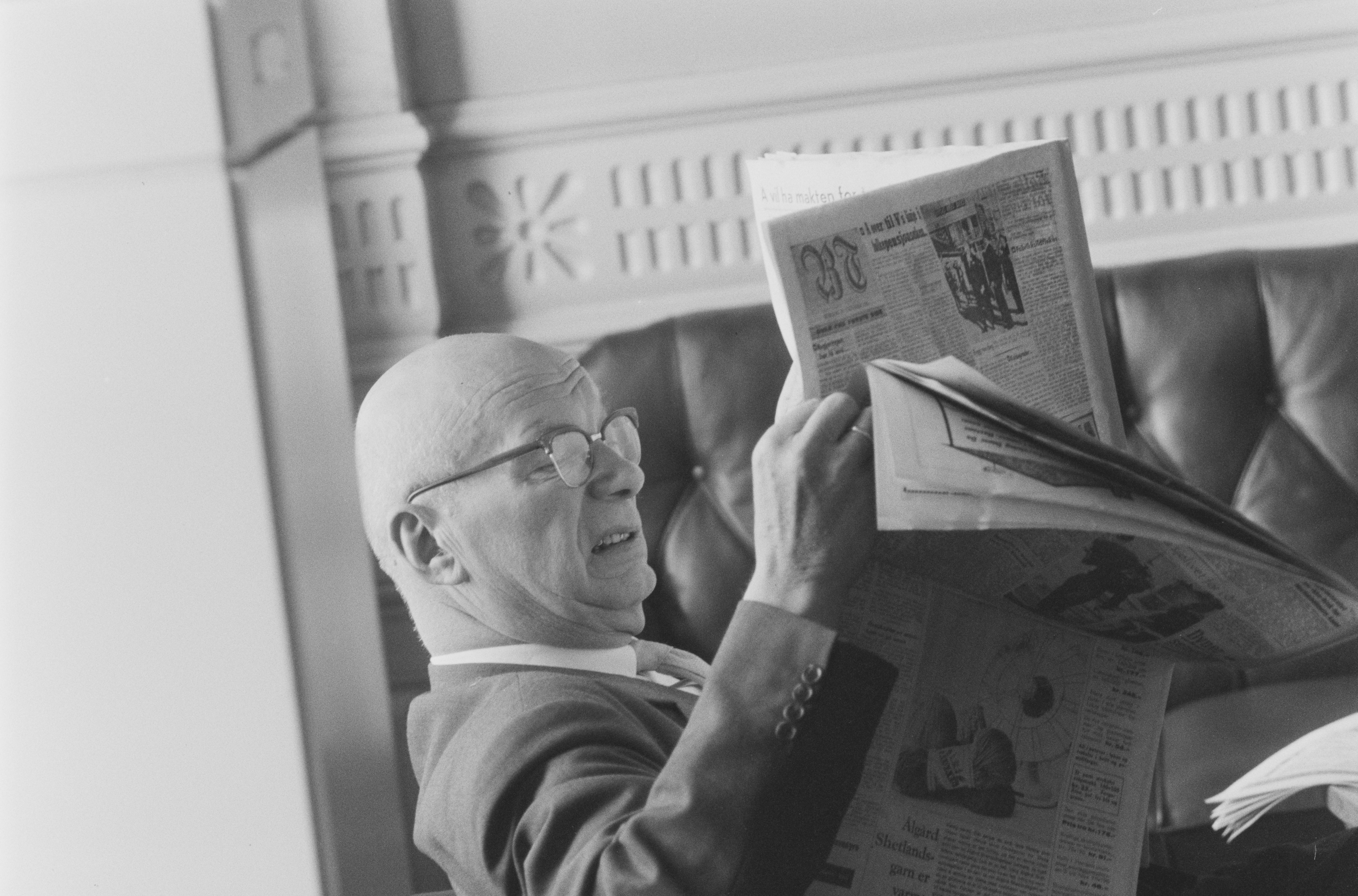 Bildet er hentet fra Arkivverket. Regjeringen Lyngs siste dag, fra debatten i Stortinget Arkivinstitusjon : Riksarkivet Arkivnavn : Billedbladet NÅ Sted : Norge, Oslo, Oslo, Stortinget Emneord: Regjeringer, Lyng Avbildet: Lars Ramndal (1893–1971), venstremann fra Rogaland og formann i Stortingets justiskomité 1945–1965 (jamfør bilde her)